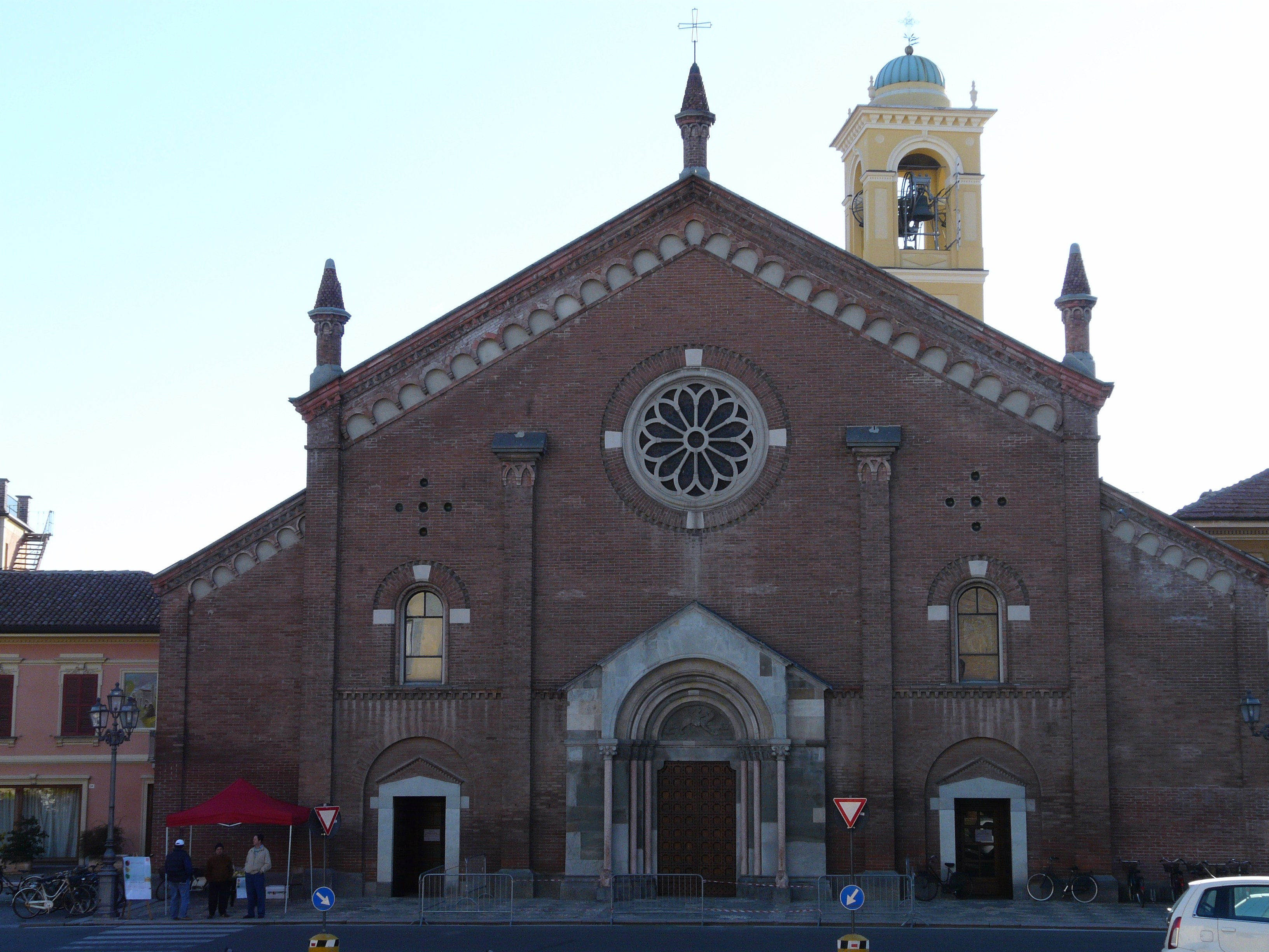 Chiesa dei SS Pietro e Paolo, Castelnuovo Scrivia, Piemonte, Italy